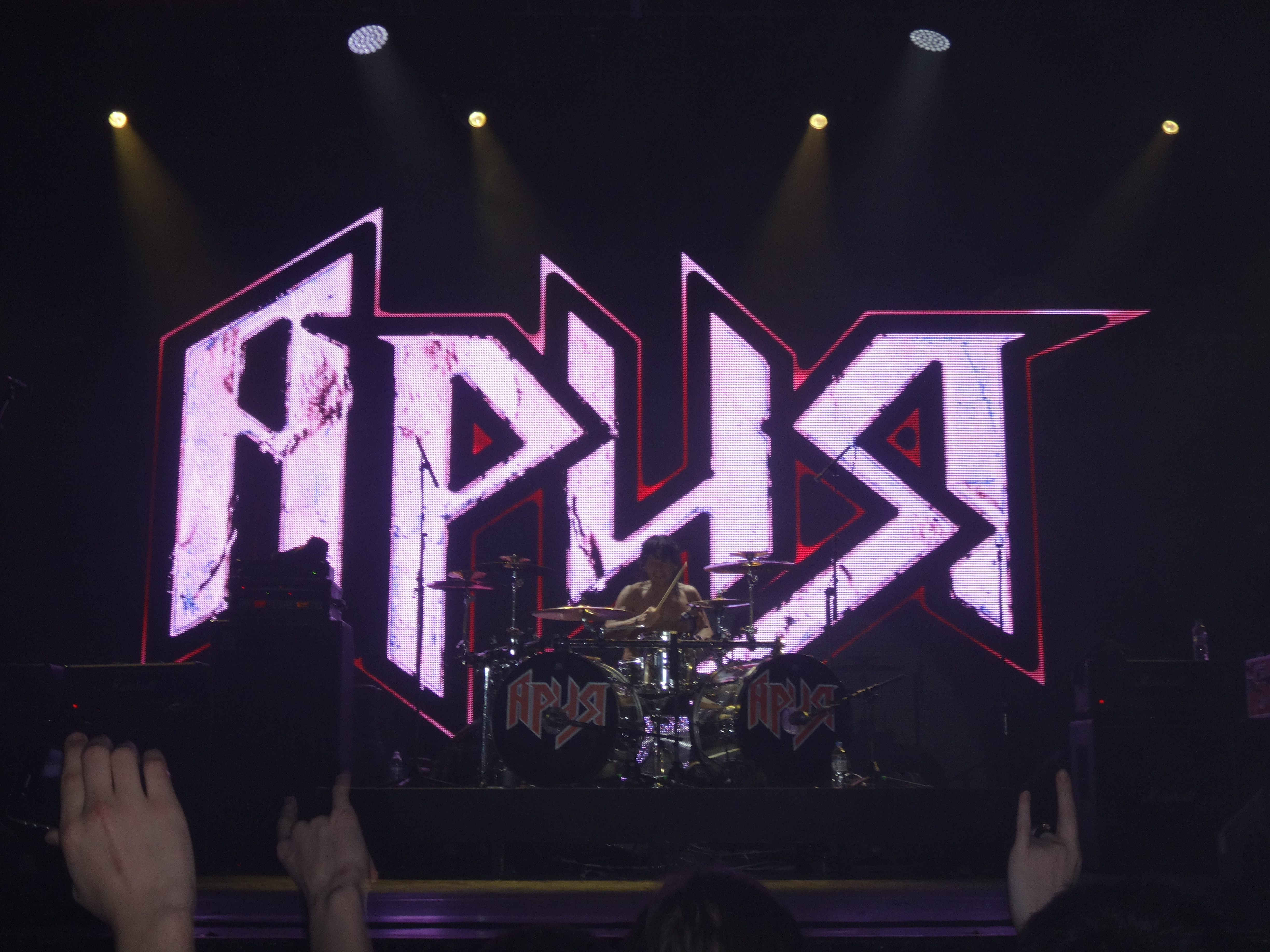 Соло Утконоса, группа "Ария"